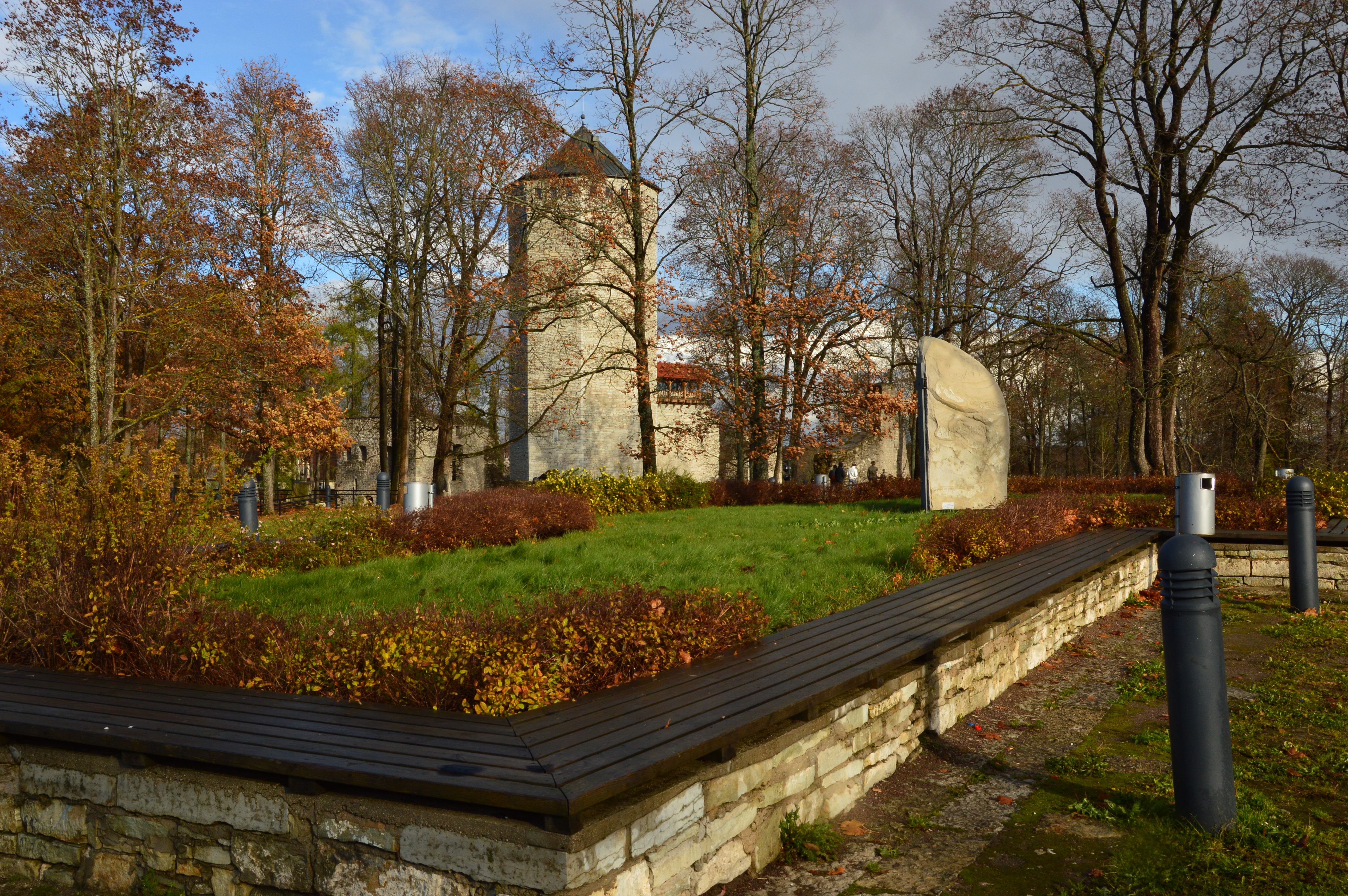 Mahapõlenud õigeusu kiriku alusmüür. Puude tagant paistavad Paide ordulinnuse varemed.